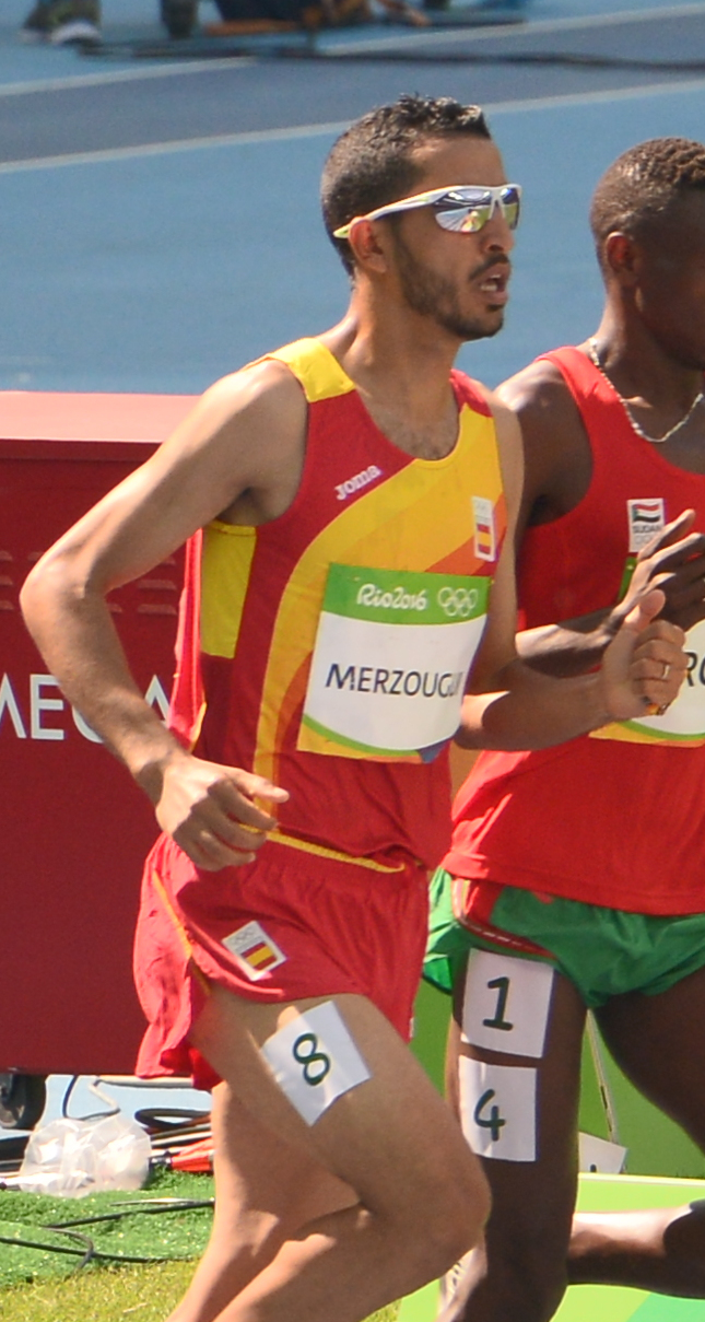 Série du 3000m steeple Homme des JO de Rio, 2016